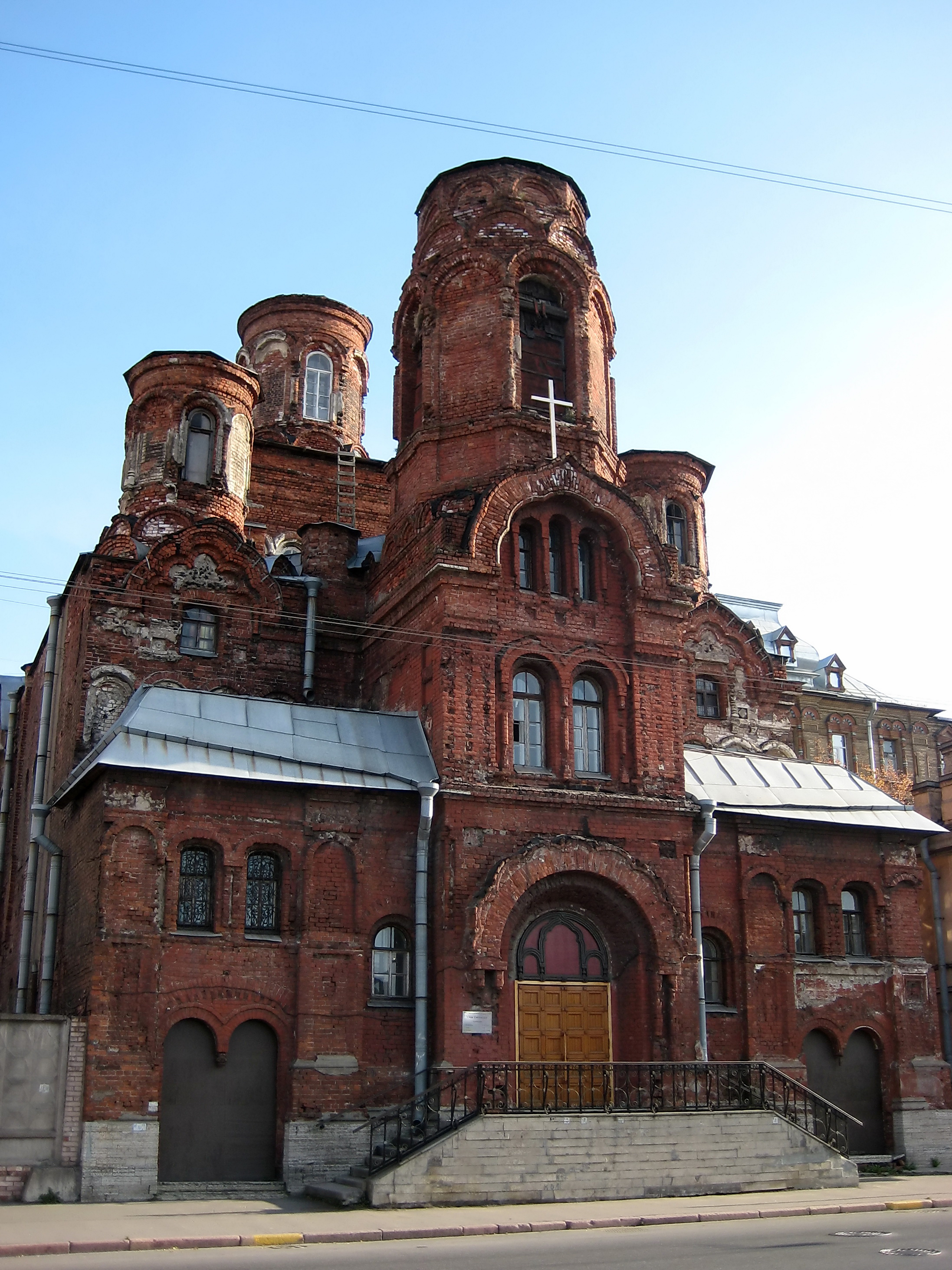 Церковь покрова божьей матери (Санкт-Петербург и Лен.область, Санкт-Петербург, боровая улица, 52)